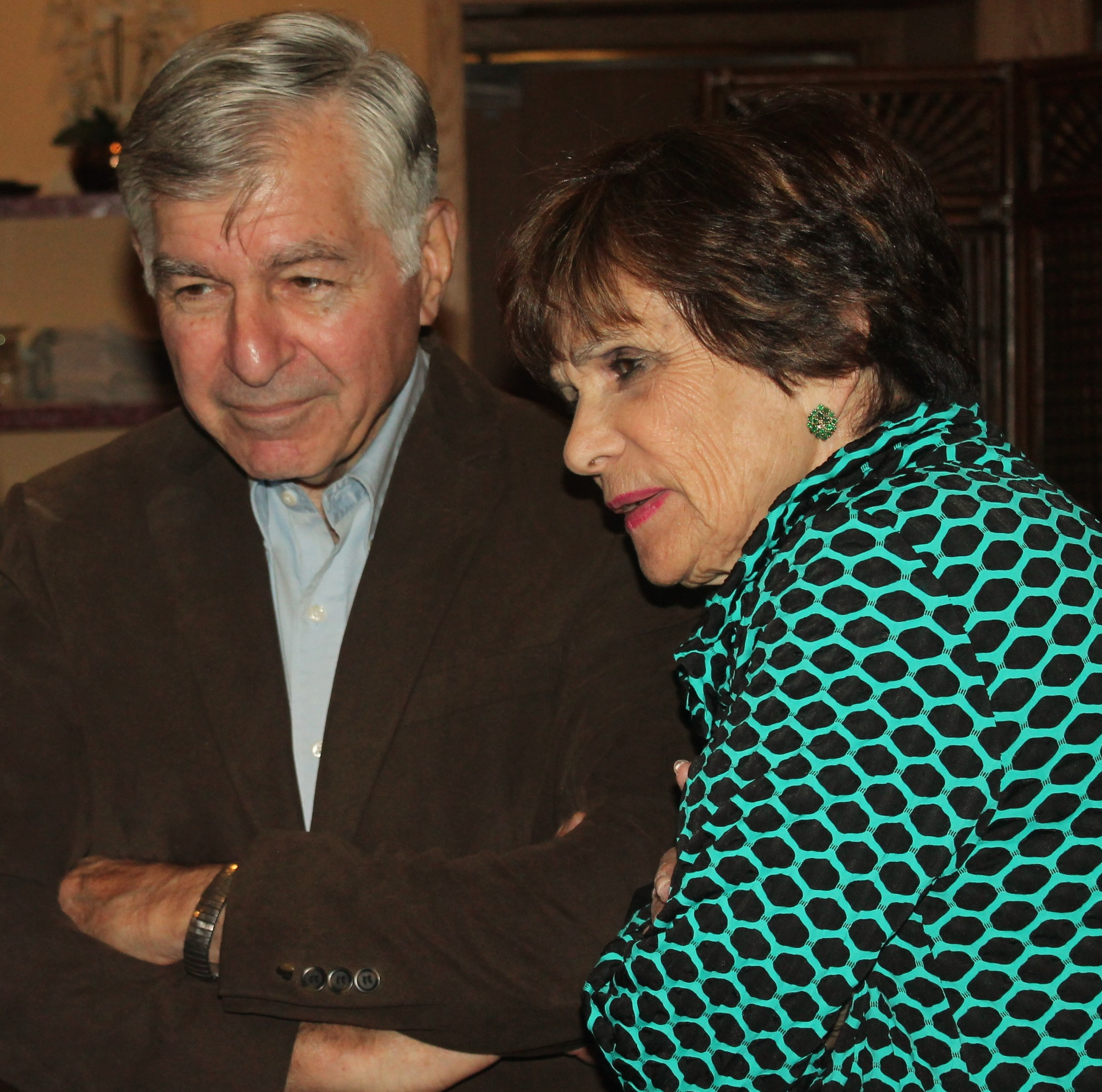 md9